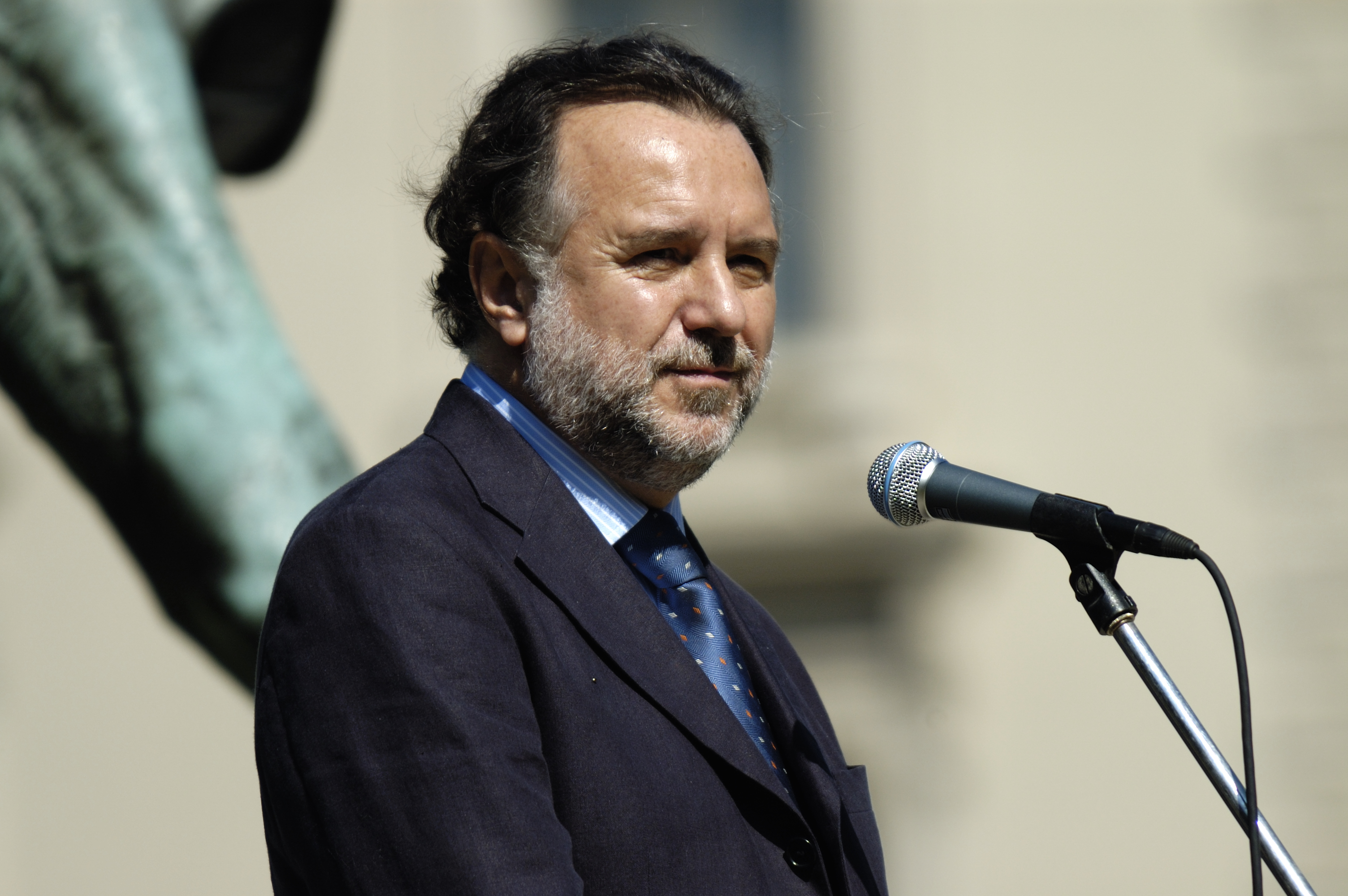 Mariano Fernández Amunátegui (Santiago, 21 de abril de 1945) es un politólogo, diplomático, académico e investigador chileno, actual ministro de Relaciones Exteriores del gobierno de la presidenta Michelle Bachelet.